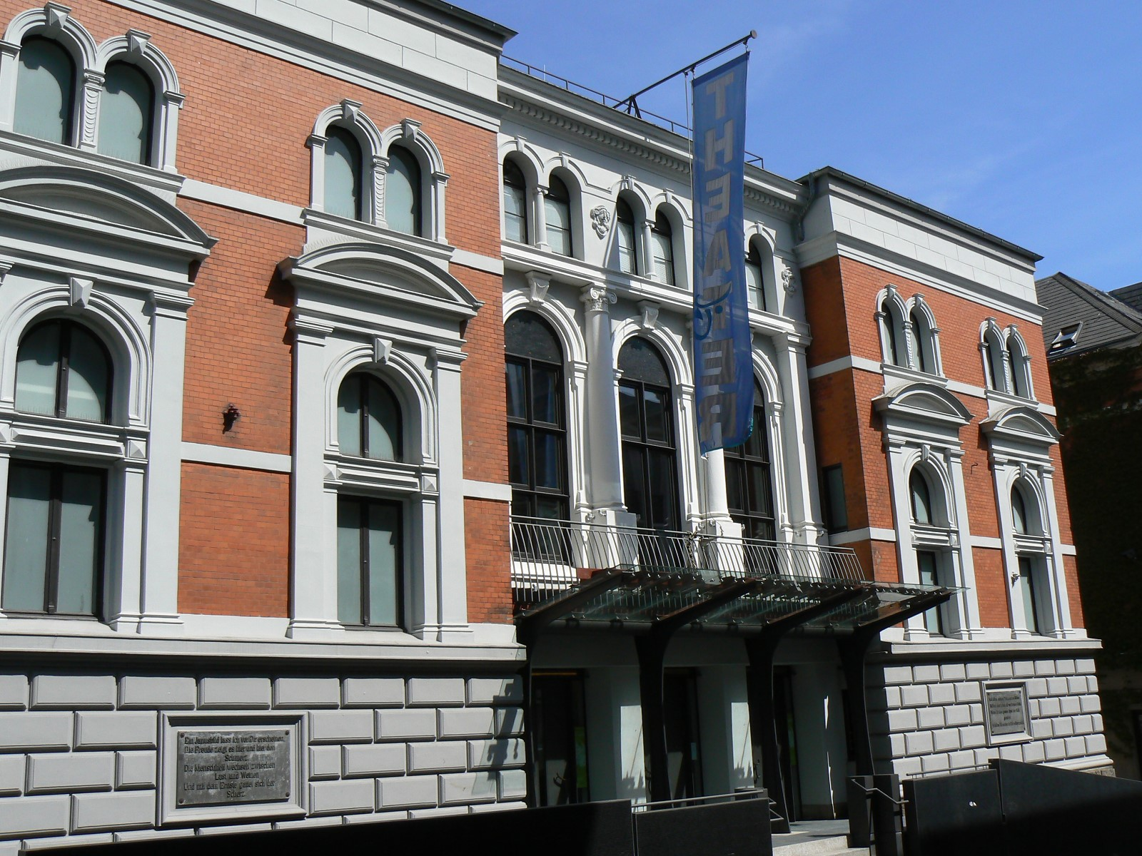 Theater in Flensburg.